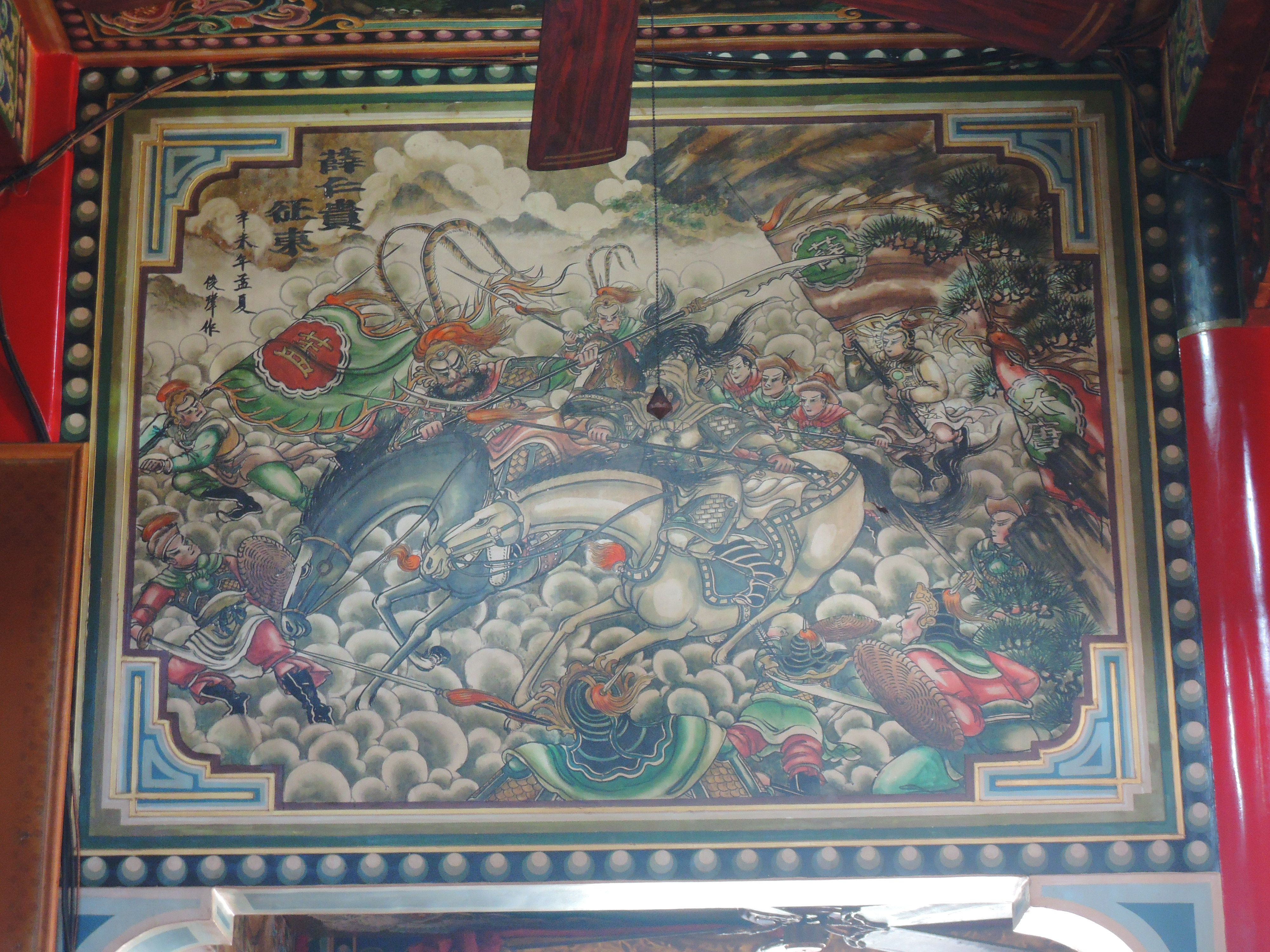 菜園東安宮，主祀朱府王爺。